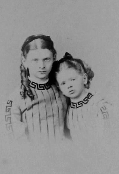 Графини Строгановы, Мария Александровна (1850—1914) и Ольга Александровны (1857—1944).